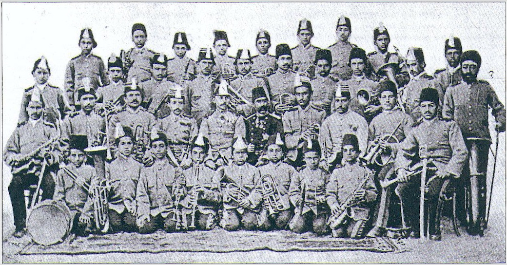 گروه نوازندگان سرود سلام شاه